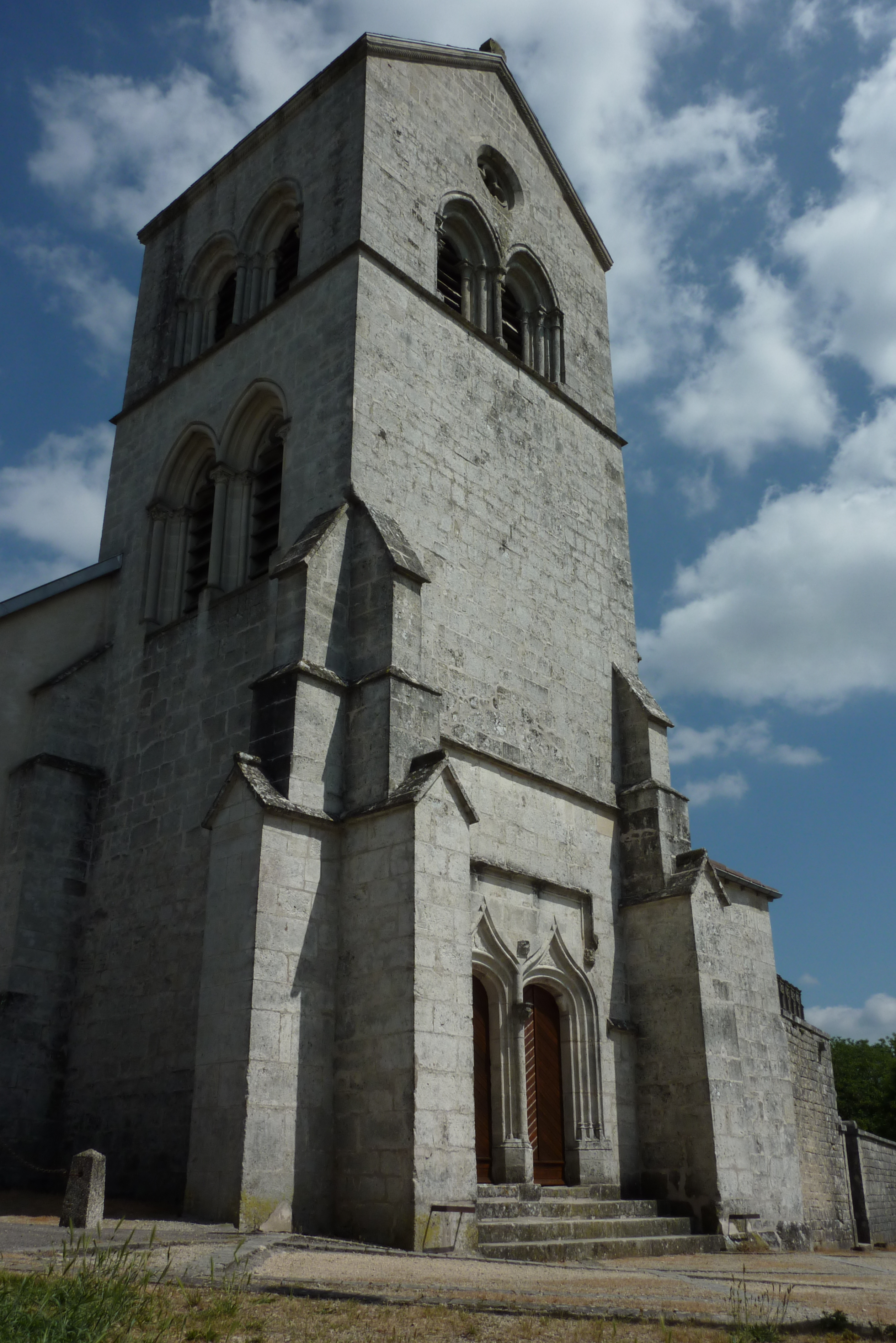 Kirche Saint-Élophe in Saint-Élophe, Ortsteil von Soulosse-sous-Saint-Élophe